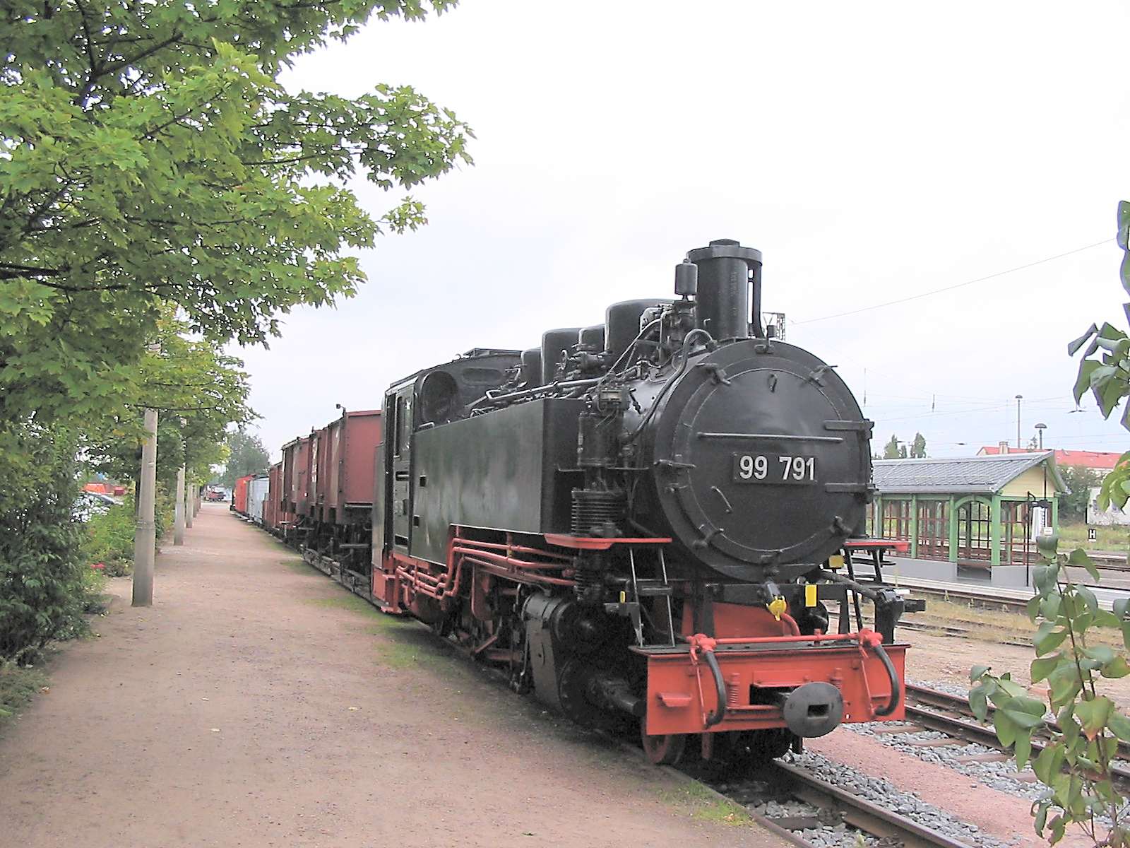 Bahnhof Radebeul Ost: Am Alten Güterboden; Schmalspurlok mit Wagen. Radebeul, Sachsen, Deutschland.